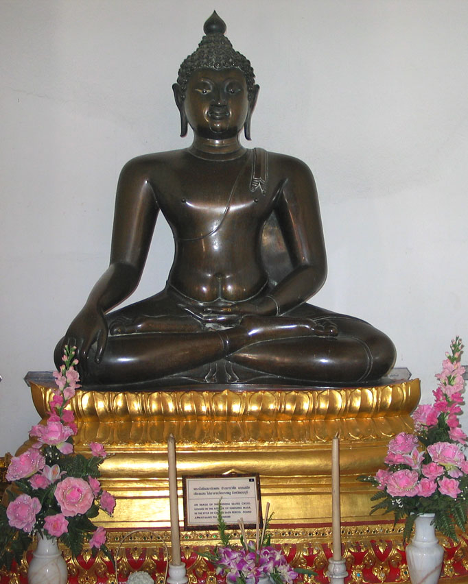 Sitting Buddha, Subduing Mara, Chiang Saen style, Wat Benchamabophit, Bangkok, Thailand